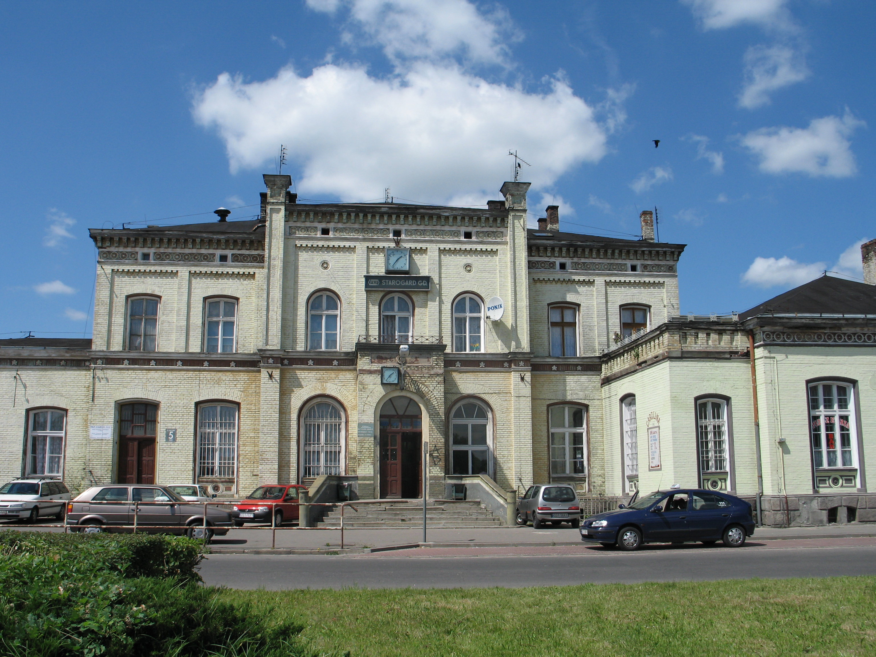 Budynek dworca PKP w Starogardzie Gdańskim. Widok od Alei Wojska Polskiego.